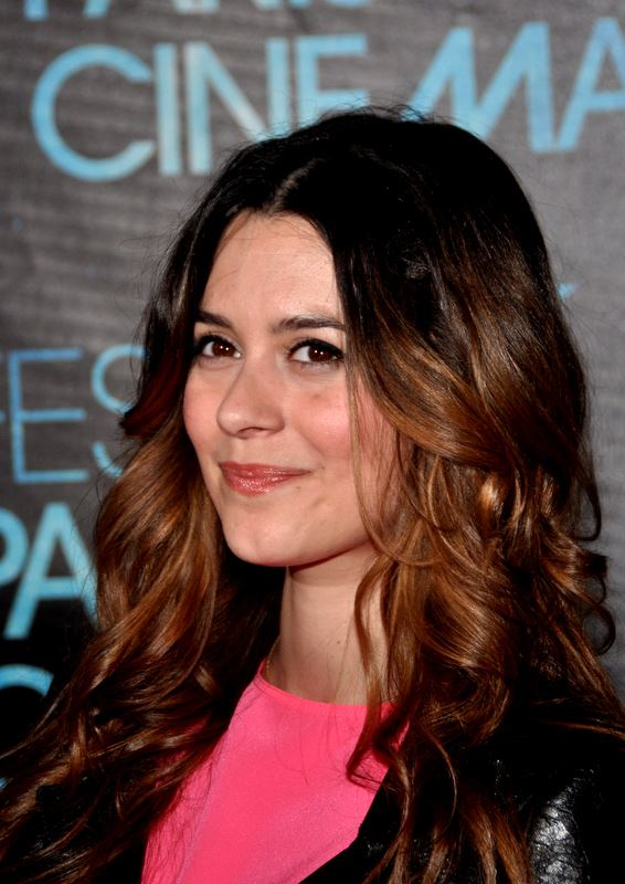 Emilie Simon au festival "Paris Cinéma"